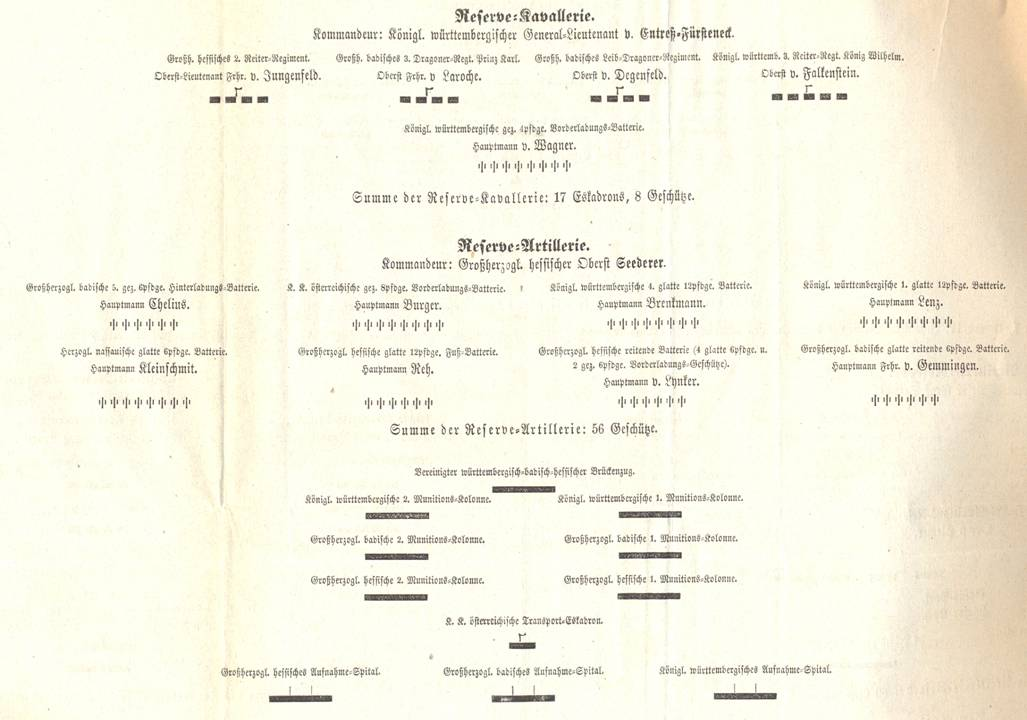 Ordre de bataille' der Reserve-Kavallerie und Reserve-Artillerie im VIII. Bundes-Armee-Korps im Deutschen Krieg 1866